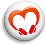 Logotipo de la red social Muaaka